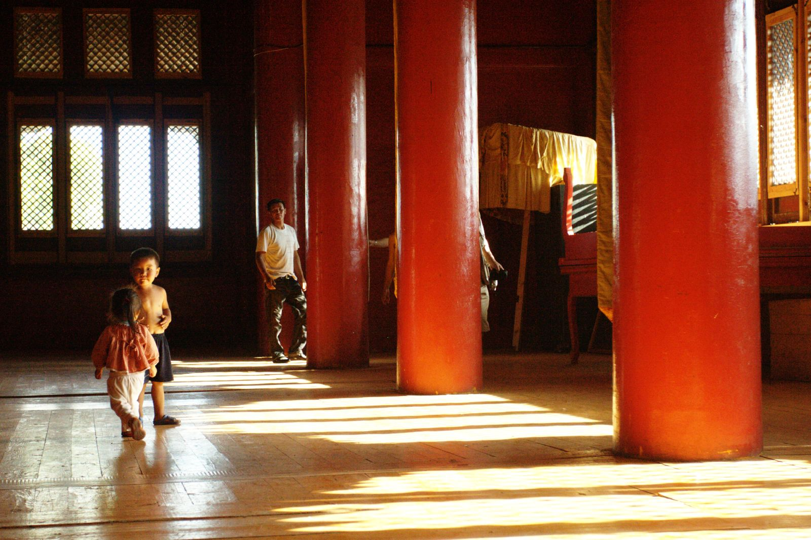 Amarbayasgalant Khiid